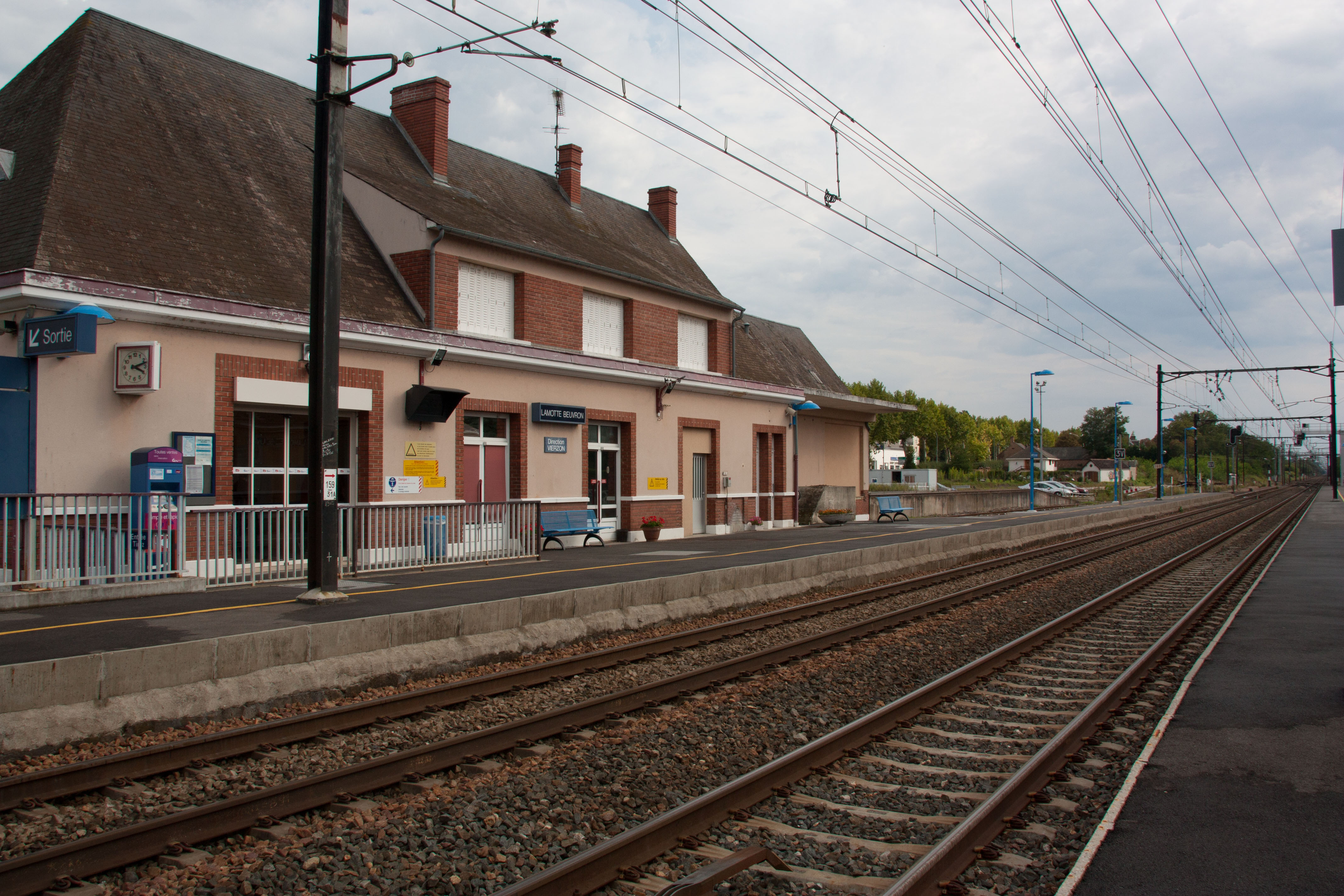 Gare de Lamotte-Beuvron, Lamotte-Beuvron, Loir-et-Cher, France.